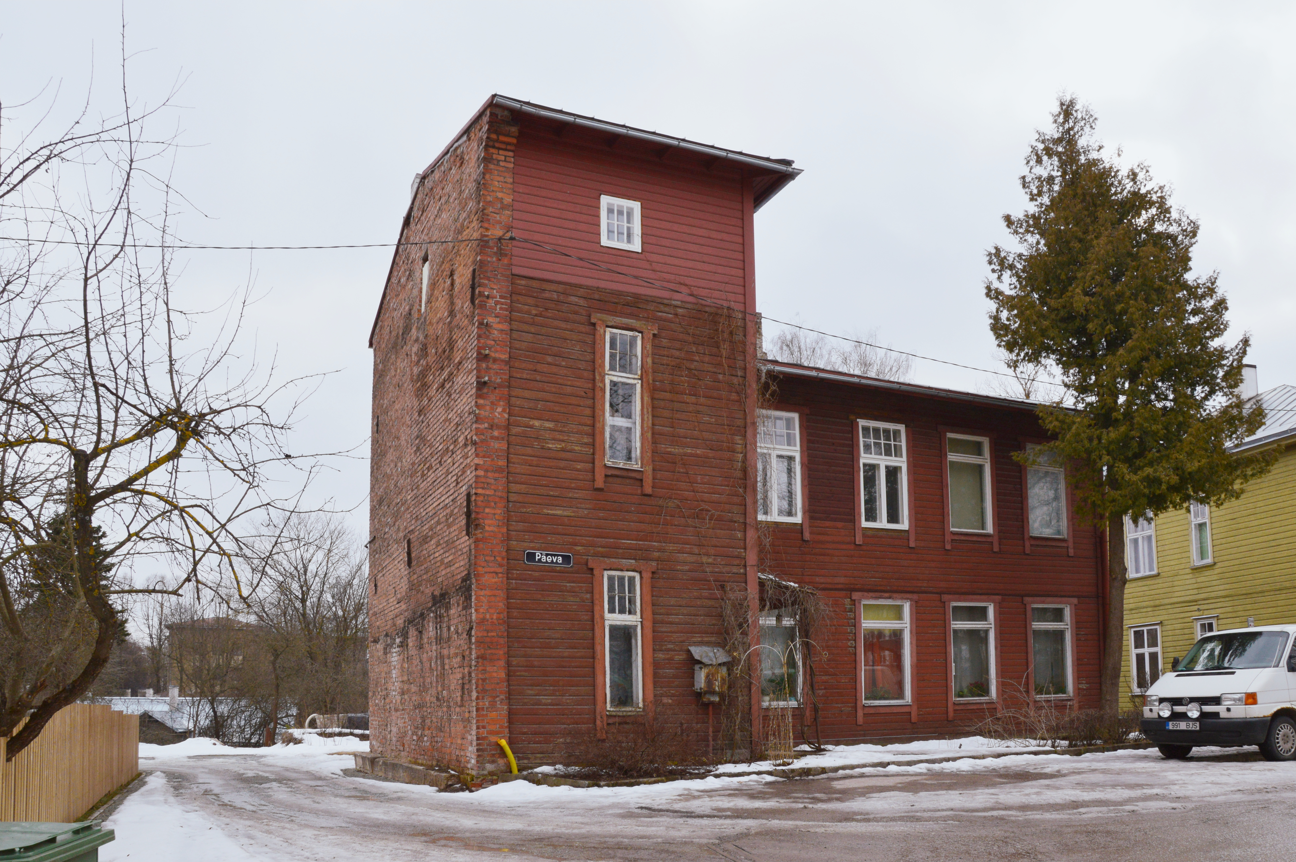 Päeva tänav 13, Tartu.